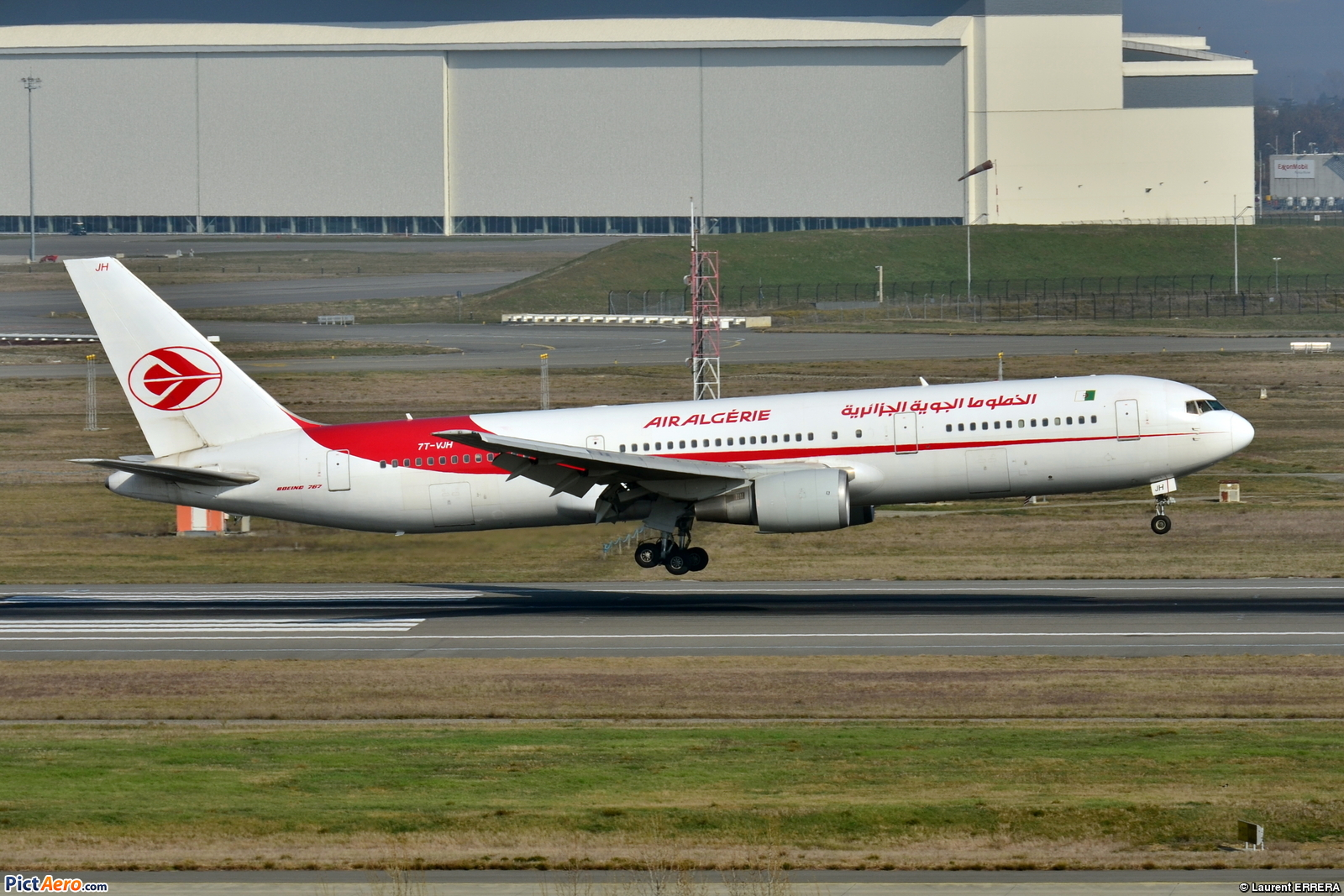 Photo prise à l'aéroport de Toulouse-Blagnac (LFBO) en France. Picture take at Toulouse-Blagnac Airport (LFBO) in France.